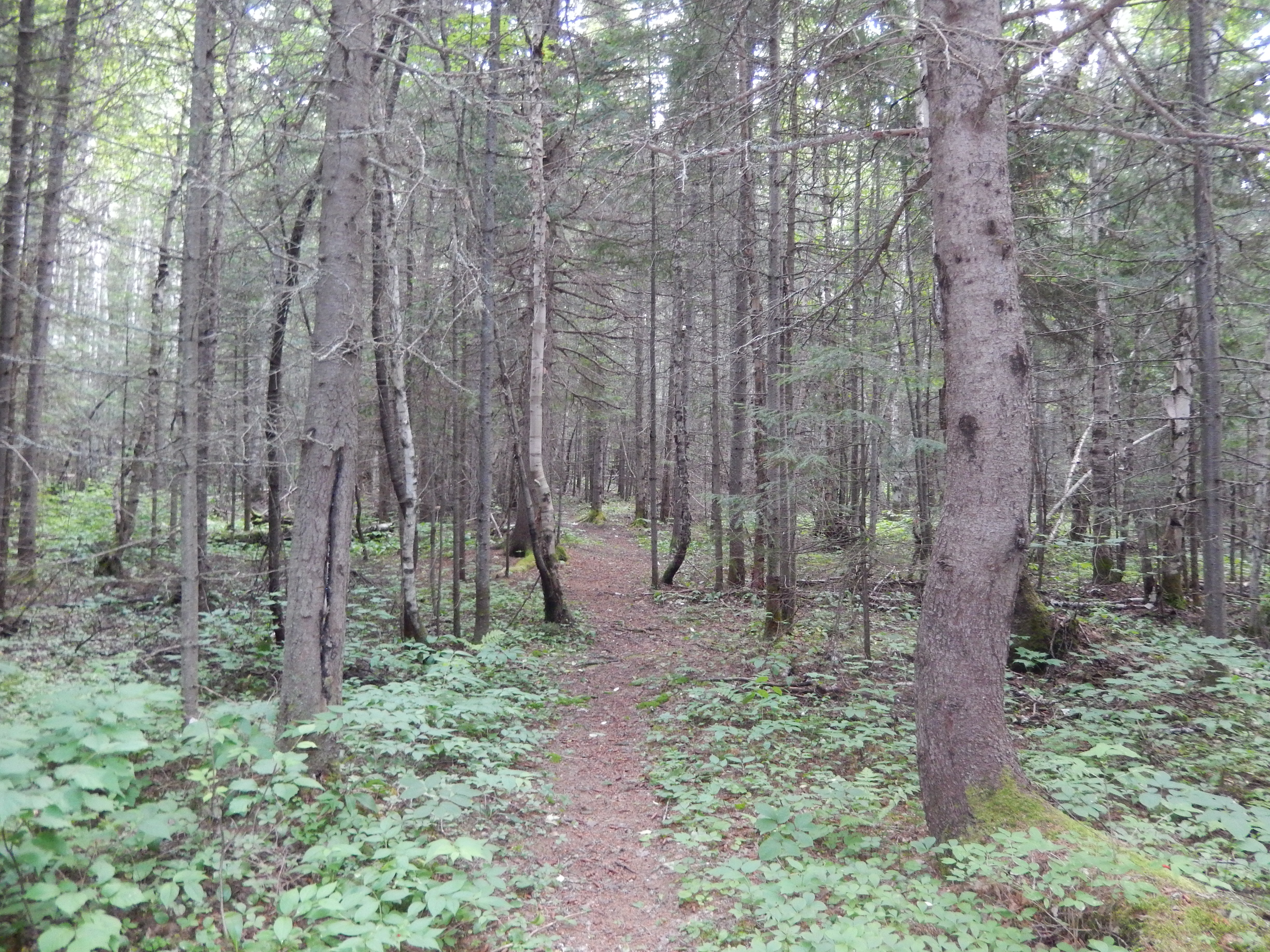 sentier dans la réserve de biodiversité des Lacs-Vaudray-et-Joannès